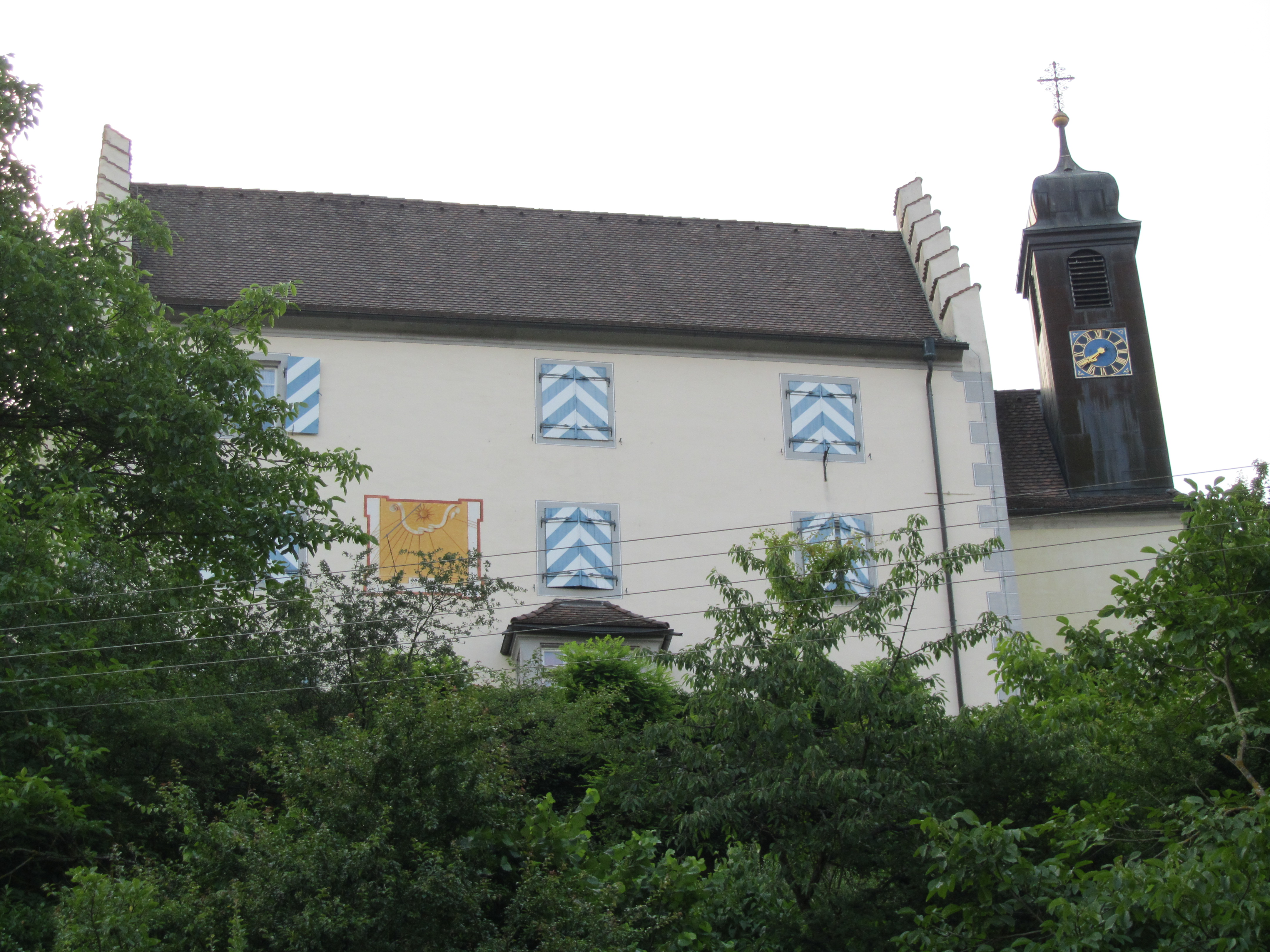 Kloster Ofteringen von Süden aus gesehen.